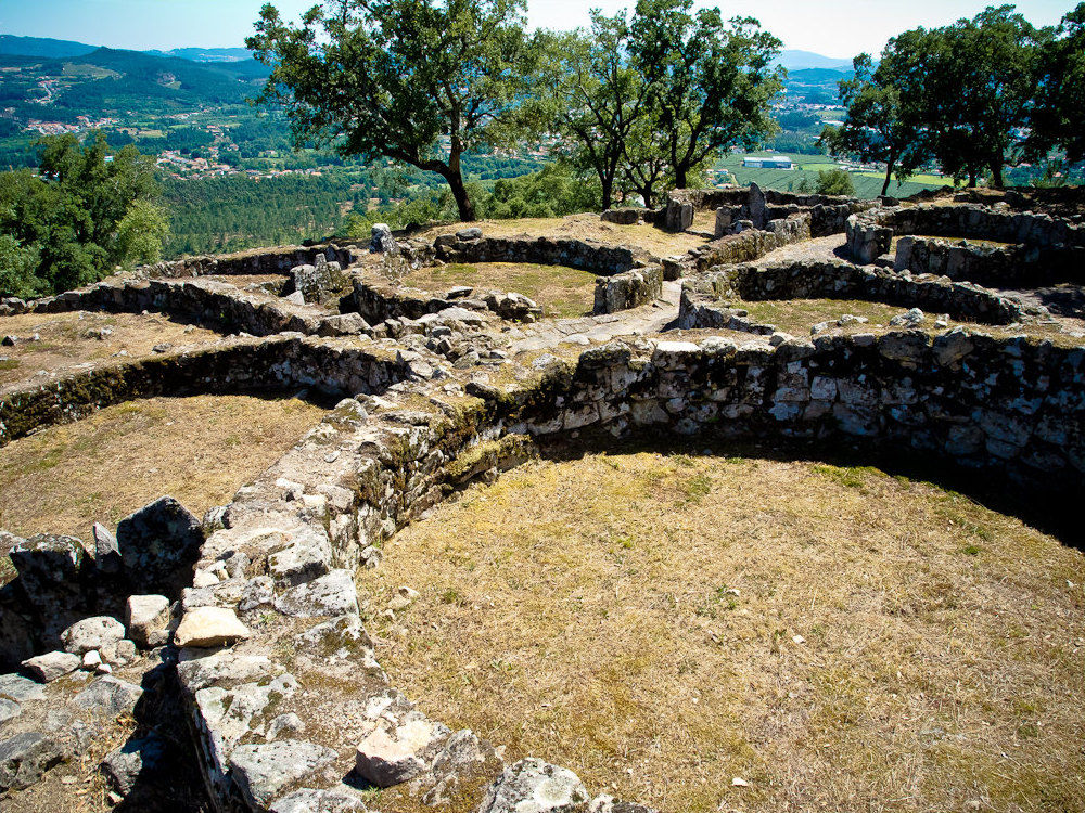 Casas arruinadas na Citânia de Briteiros.